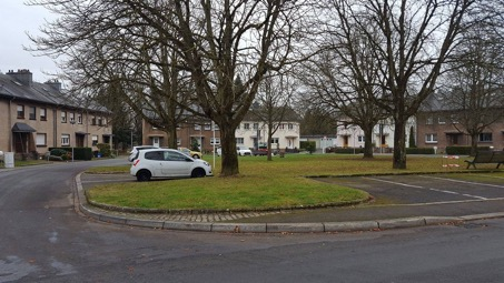 Rue du Cinquantenaire - Esch-sur-Alzette, Luxembourg